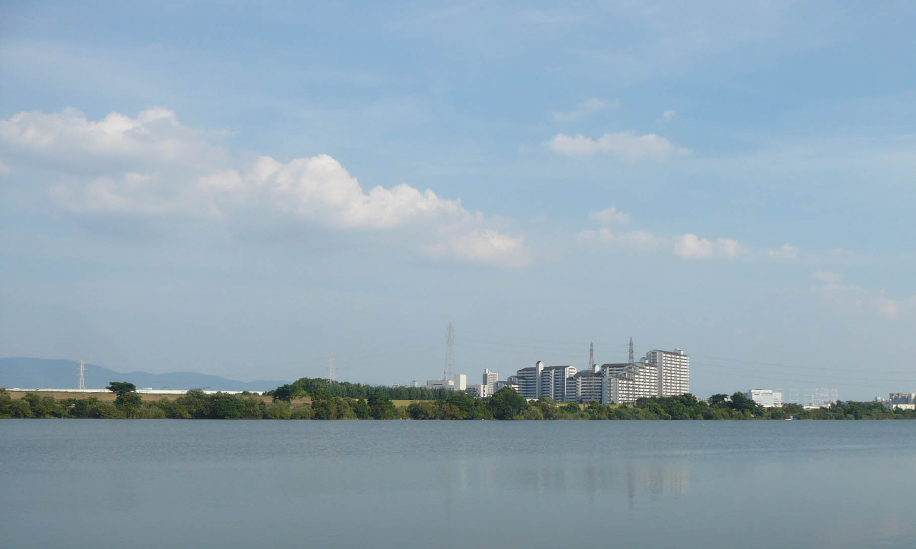 淀川